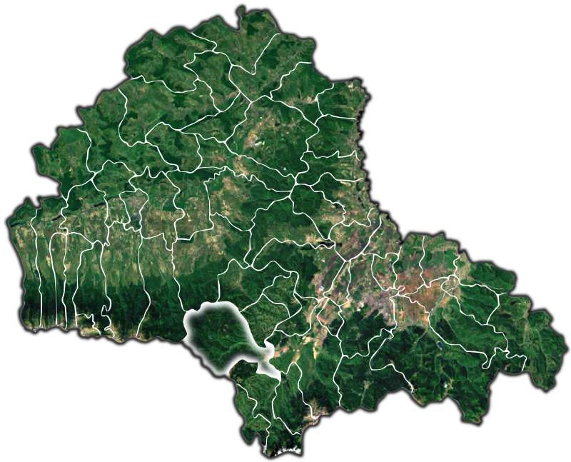 Zarnesti jud Brasov.